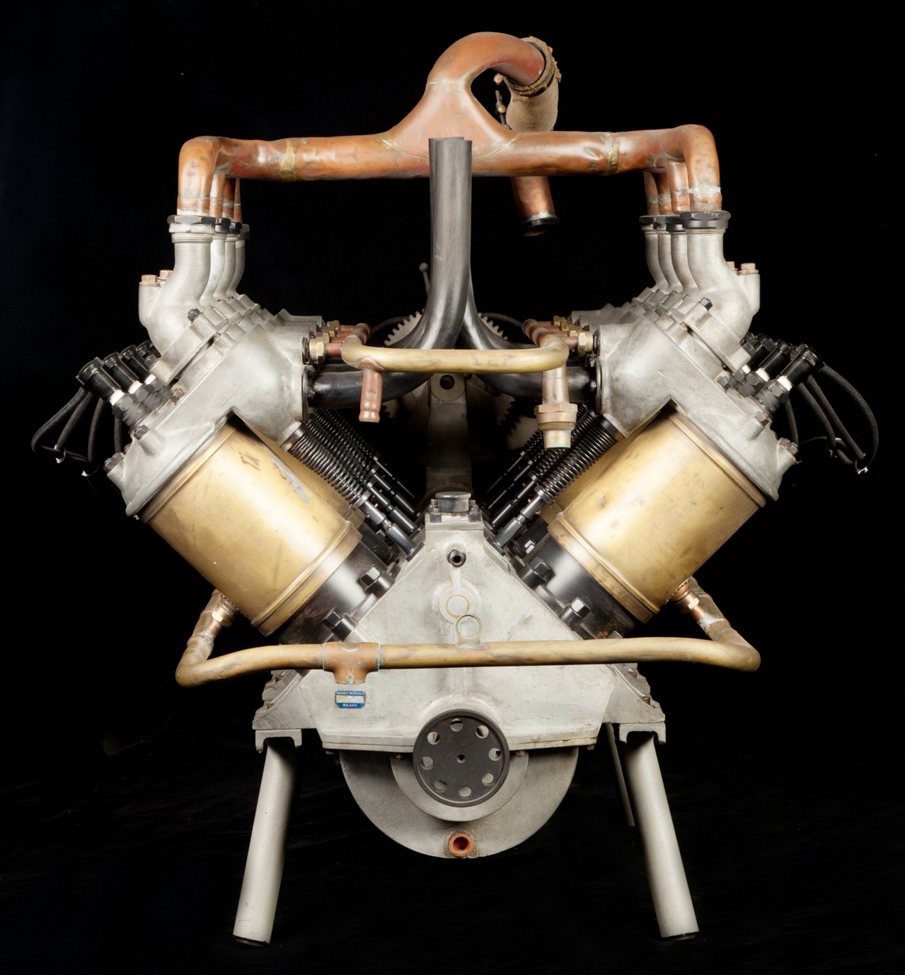 Motore aeronautico Antoinette, esposto al Museo nazionale della scienza e della tecnologia Leonardo da Vinci di Milano.